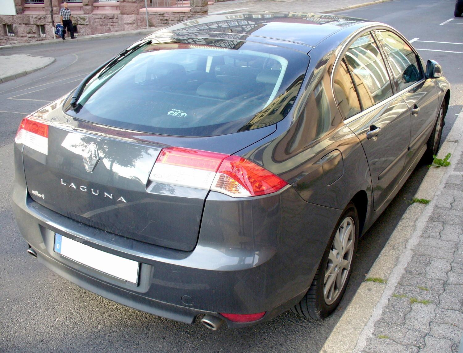 Renault Laguna III